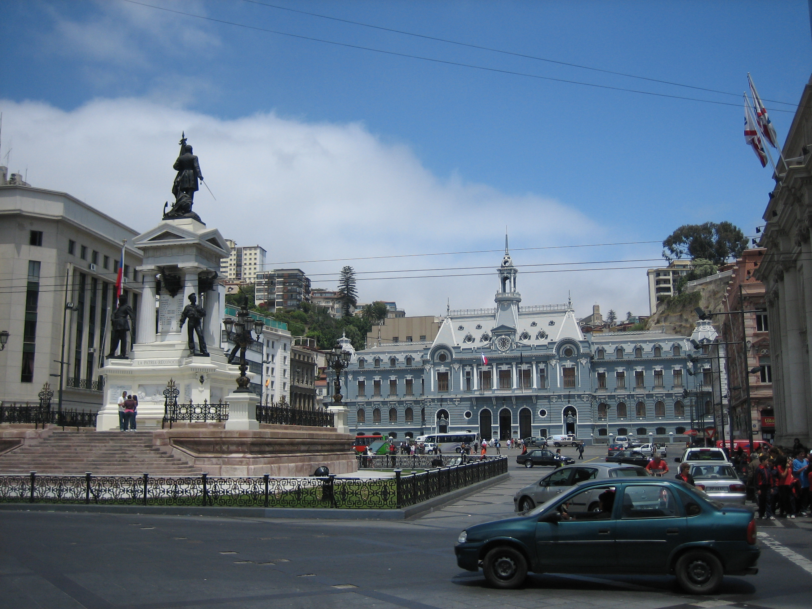 central square valparaiso